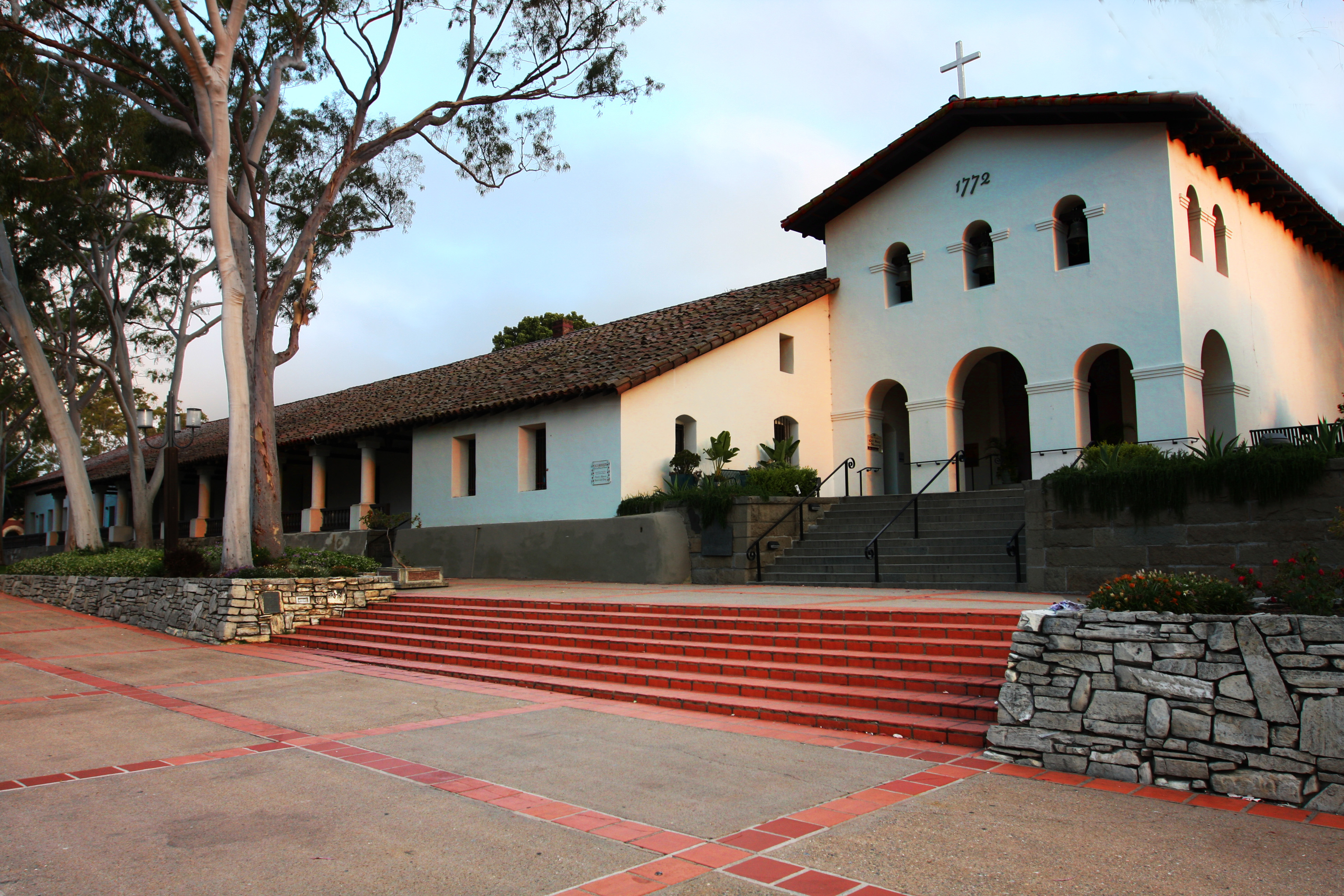 Mission San Luis Obispo, taken June 12, 2011.